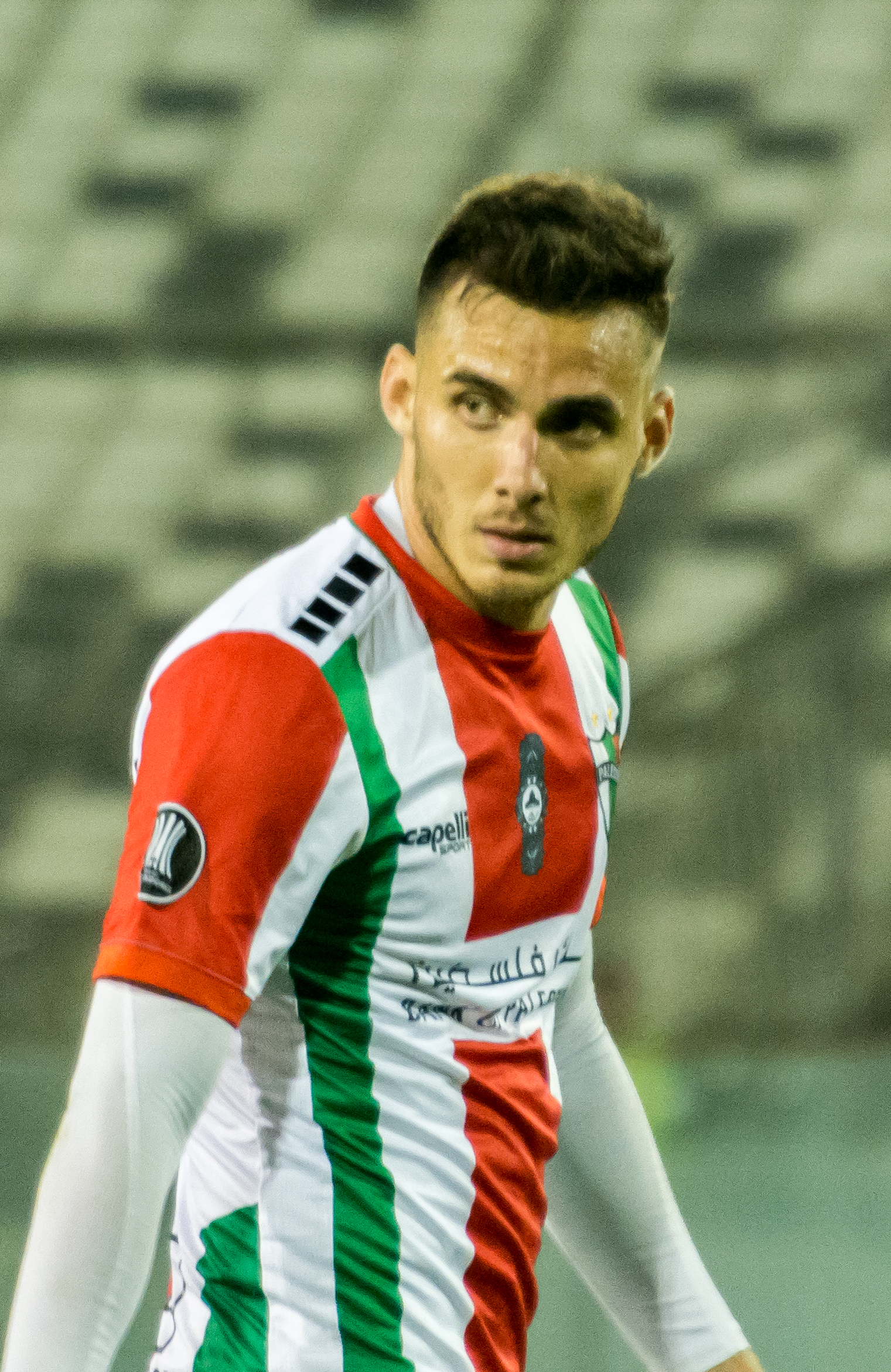 Luis Mago, Palestino vs Alianza Lima, Estadio Monumental, Macul, Santiago, Chile.